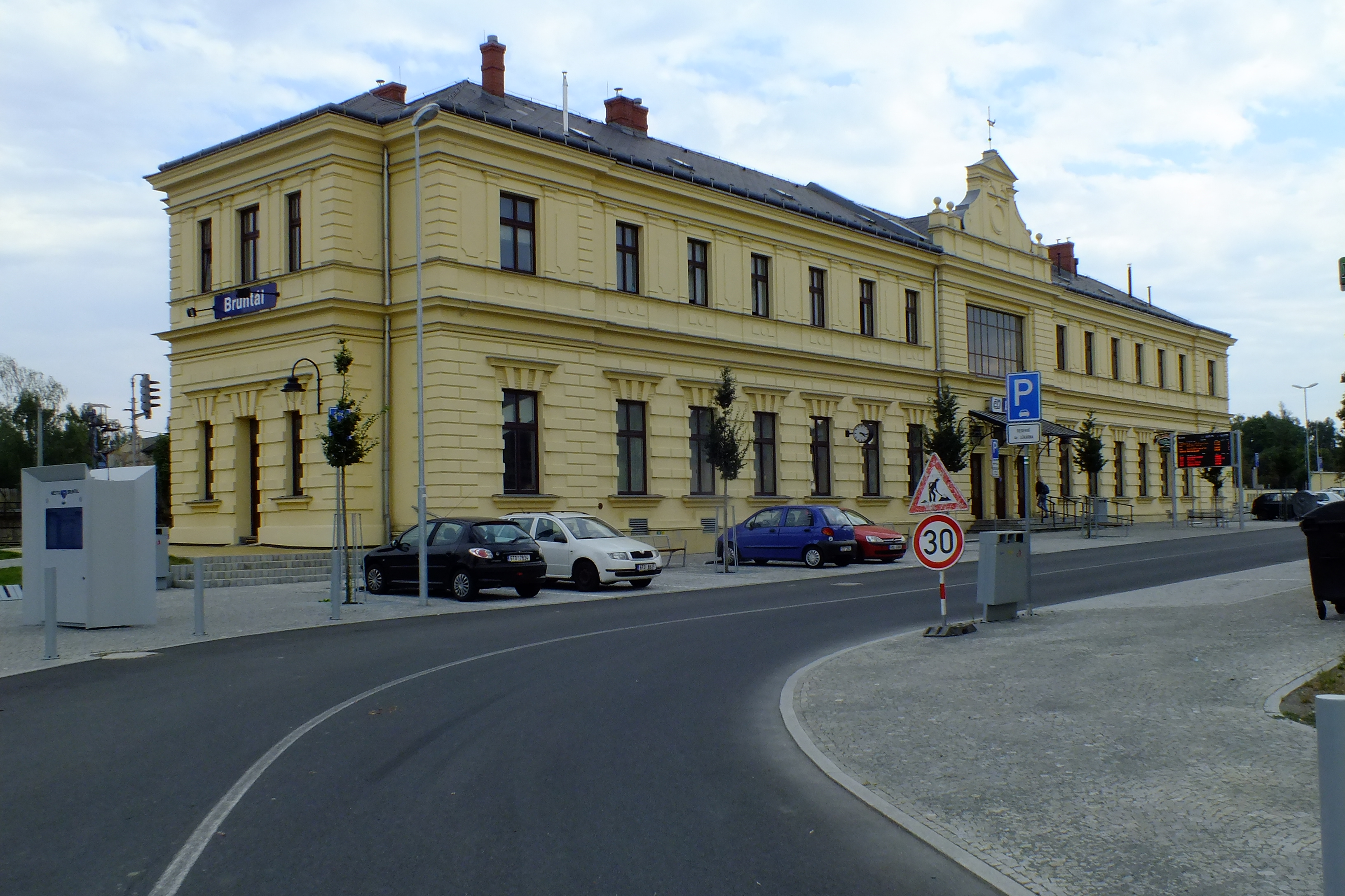 Staniční budova od ulice